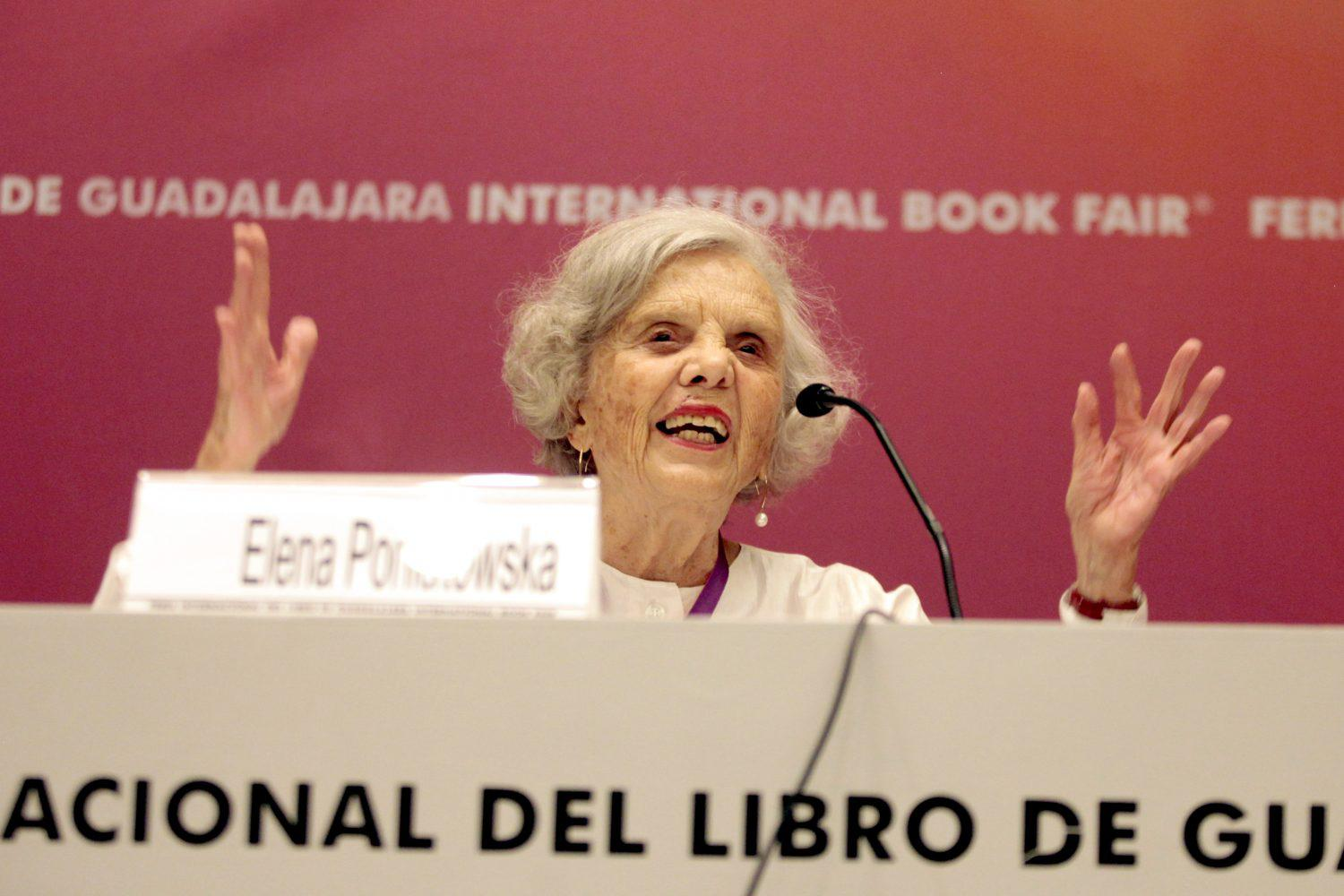 La mujer no tiene mayores problemas que un hombre a la hora de publicar una obra. El problema viene a la hora de valorarla como escritora. Esa es una de las conclusiones del mano a mano que han mantenido en la Feria Internacional del Libro de Guadalajara, dentro de la programación de Ganarás la luz, Elena Poniatowska, escritora y periodista mexicana, ganadora del Cervantes, y Soledad Puértolas, escritora, ensayista y académica española. “La mujer escritora –ha dicho Puértolas- es mujer antes que nada. El hombre escritor es solamente eso, escritor. Yo no me siento ofendida pero creo que sí hay una cierta intencionalidad ligada al hecho de la poca presencia de la mujer en muchos ámbitos”. “Es un prejuicio que no resiste ni dos segundos de razón. Todos escribimos como seres humanos, como personas, y sin embargo sigue ahí” añadió.